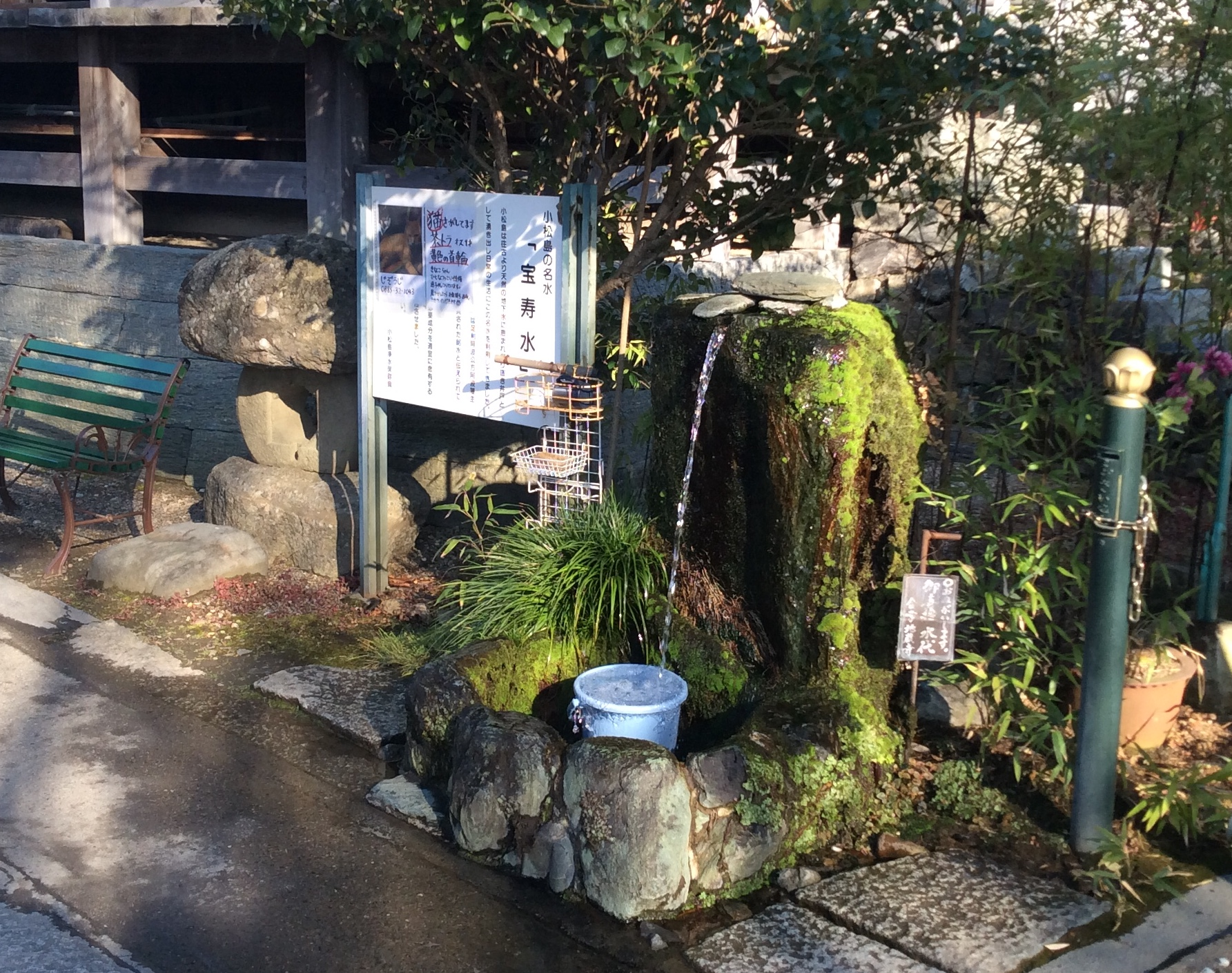 国伝山地蔵寺の名水「宝寿水」